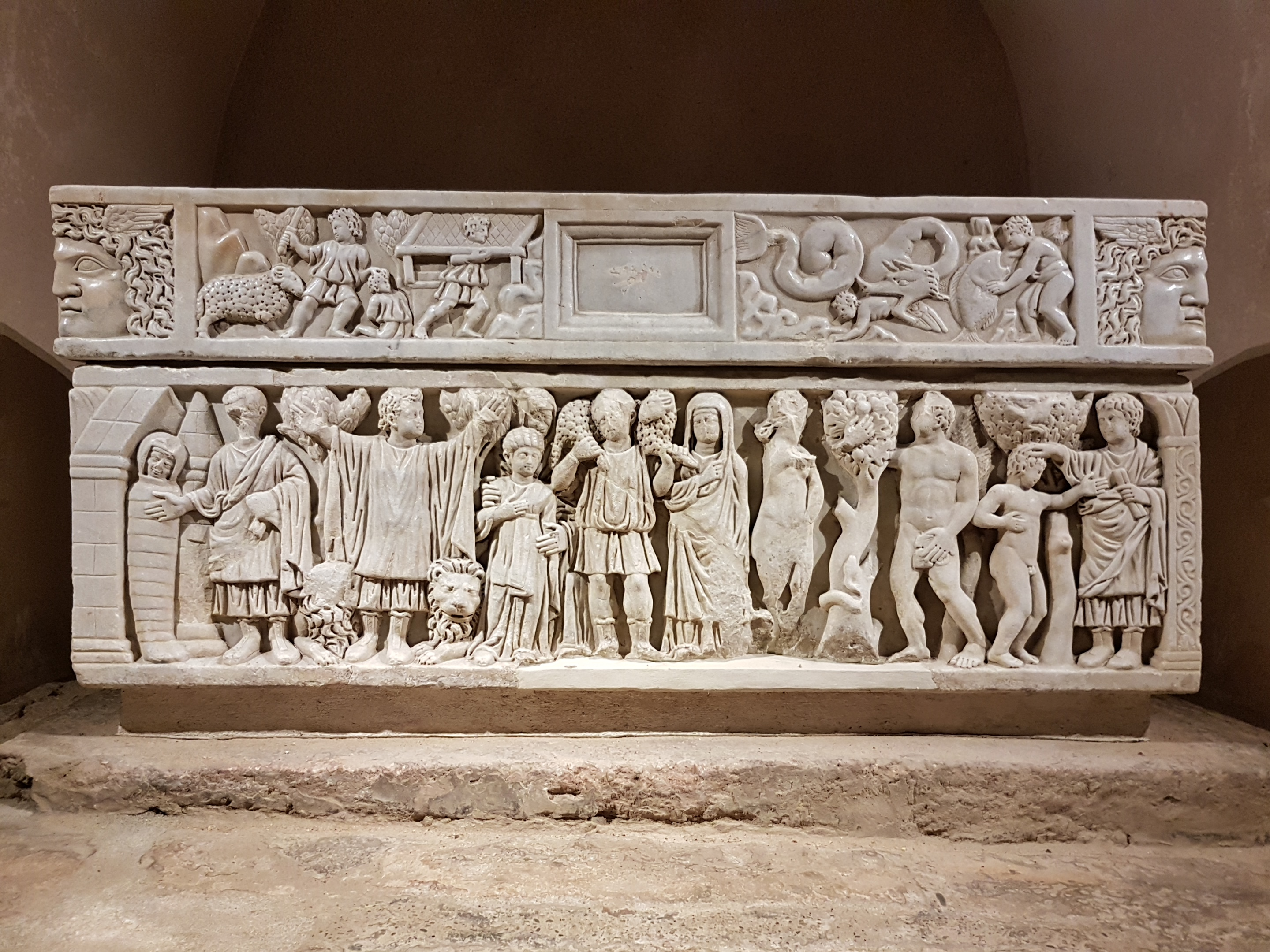 Sarcophage dit de sainte Quitterie - IVe ou Ve siècle - crypte de l'église Sainte-Quitterie à Aire-sur-l'Adour (département des Landes, France)